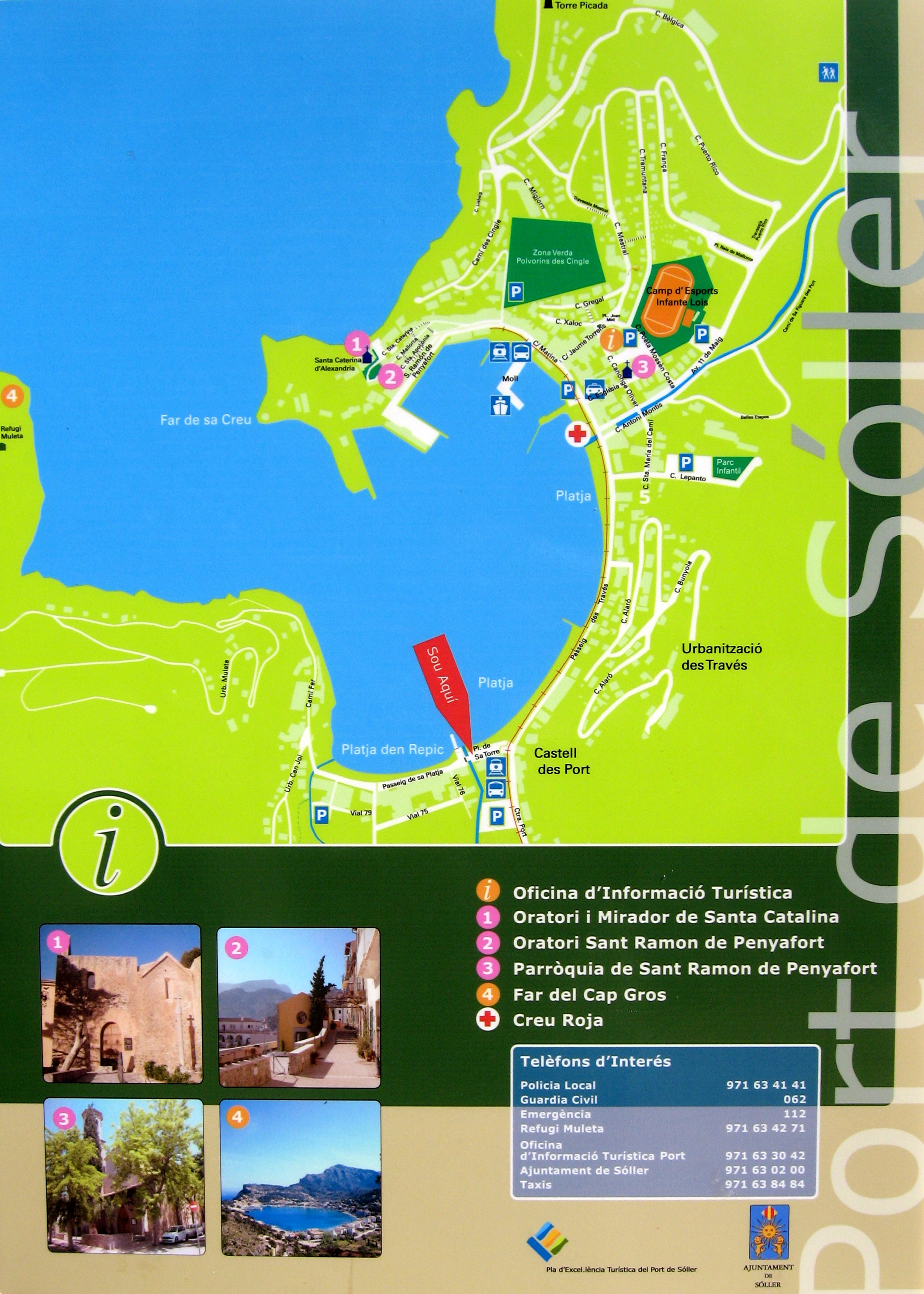 Informationstafel in Port de Sóller, Gemeinde Sóller, Mallorca, Spanien